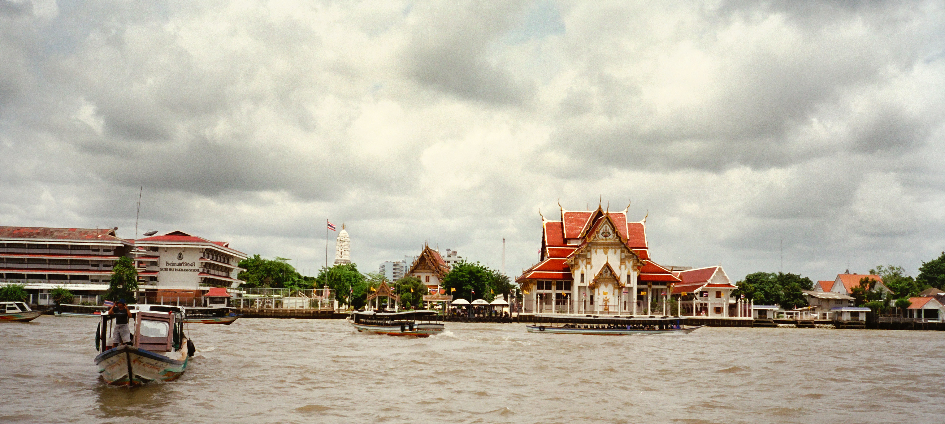 Wat Rakhang as seen from Maenam Chao Phraya, Bangkok Noi district, Bangkok, Thailand